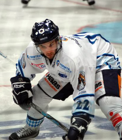 Darin Olver, ein deutsch-kanadischer Eishockeyspieler